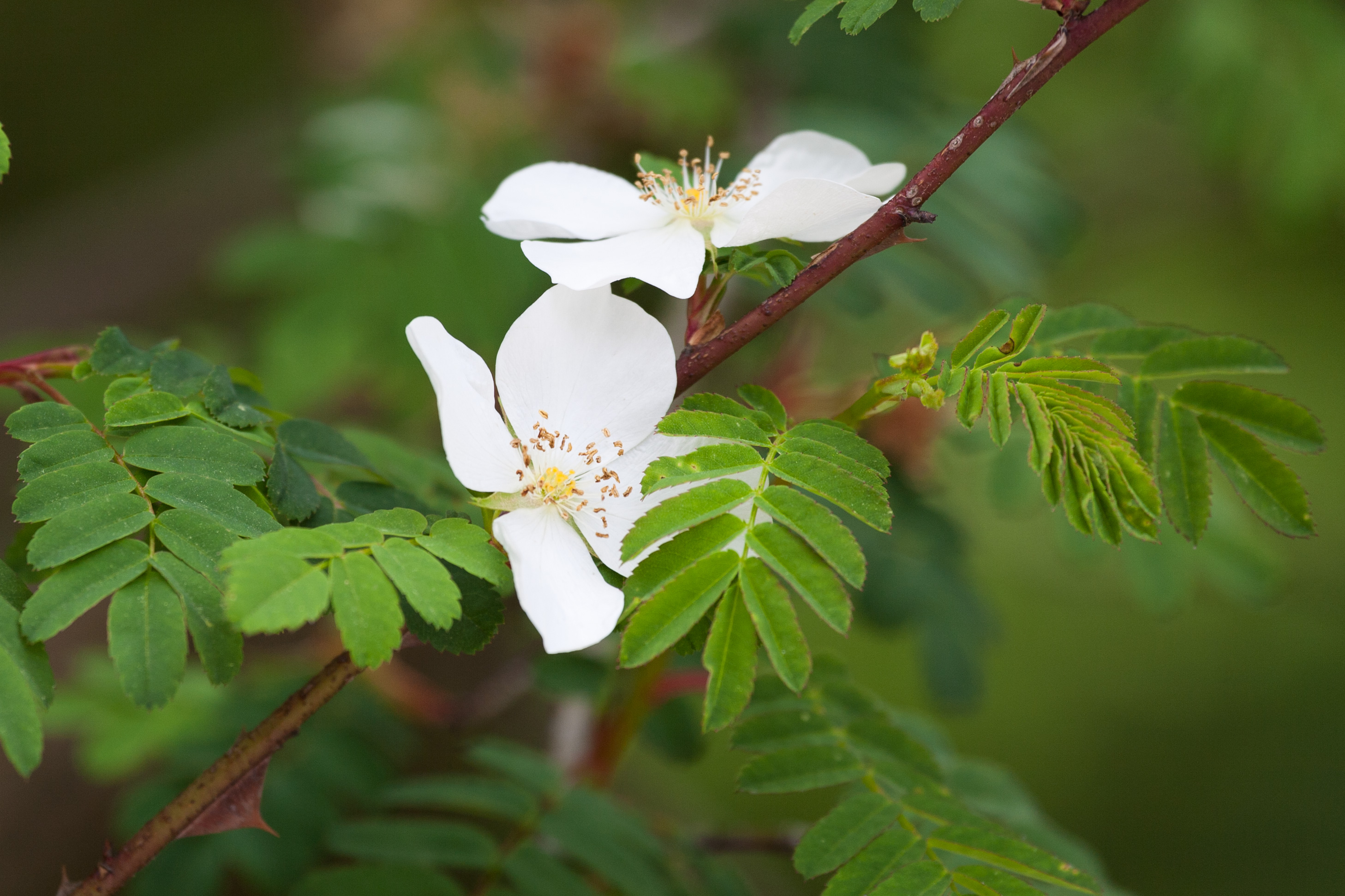 Omei-Rose (Rosa sericea var. omeiensis)